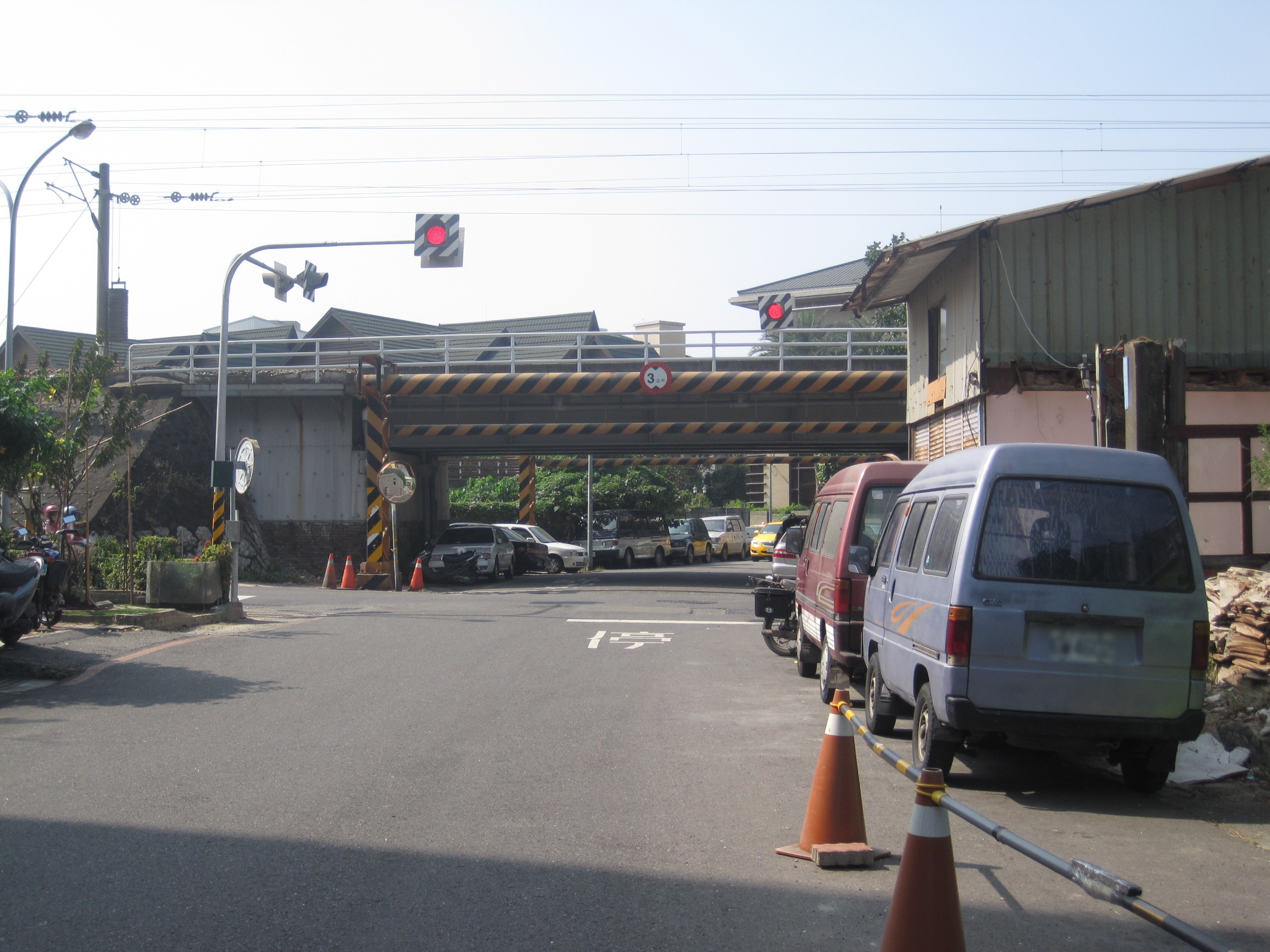 竹溪地下化河段，臺南市林森路一段153巷。